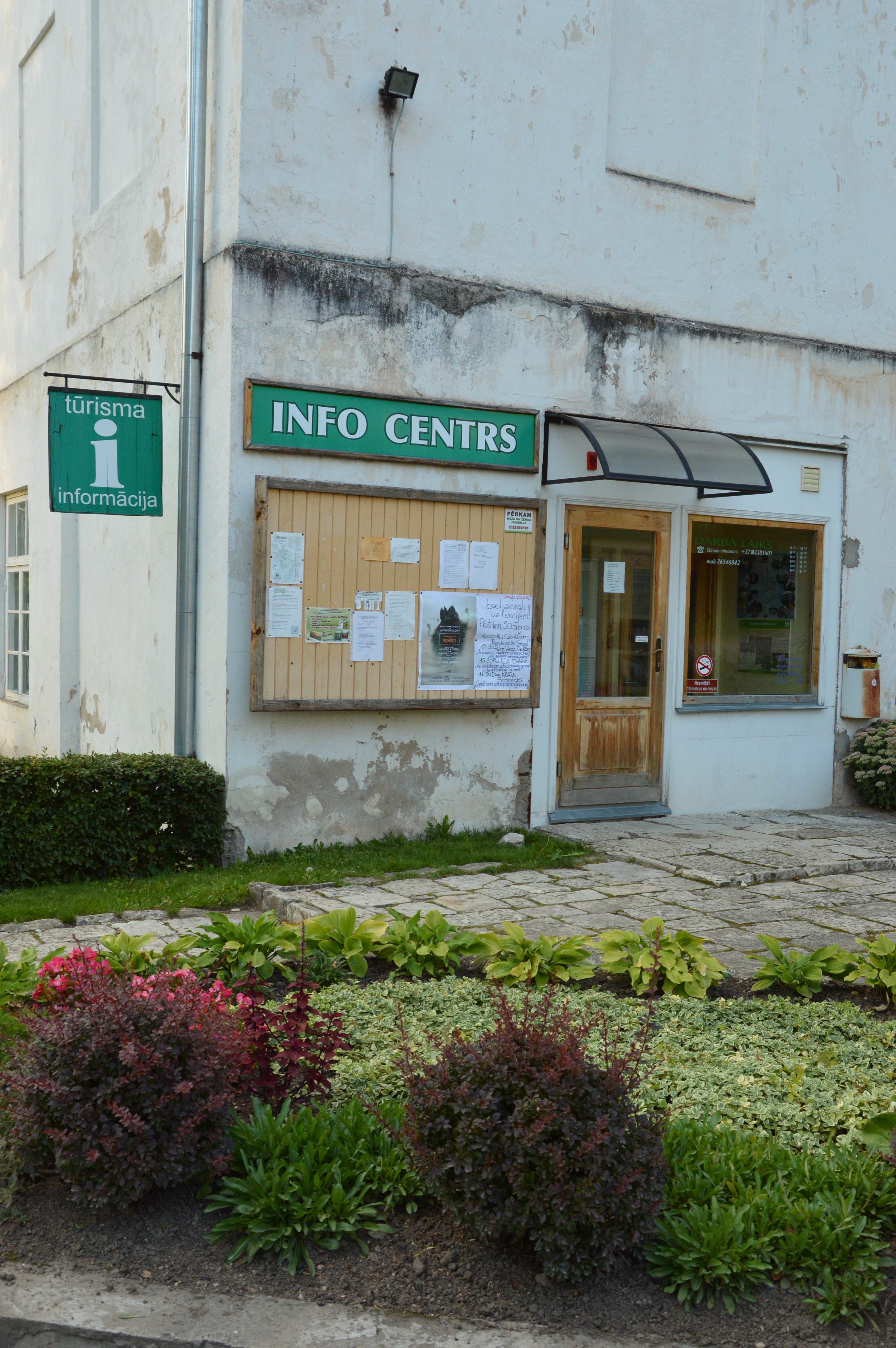 Koivaliina turismiinfopunkt